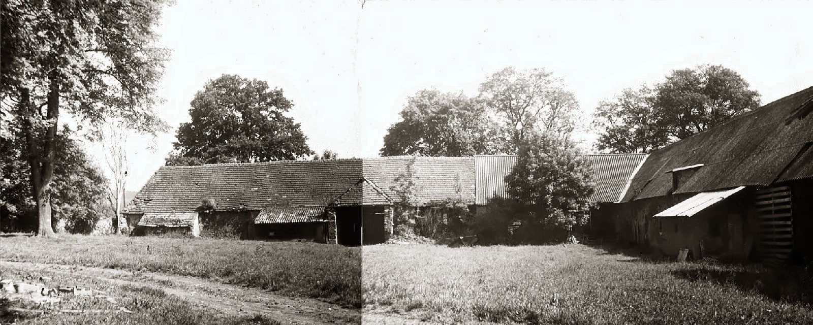 Česky: dvůr Radkovec v roce 1987